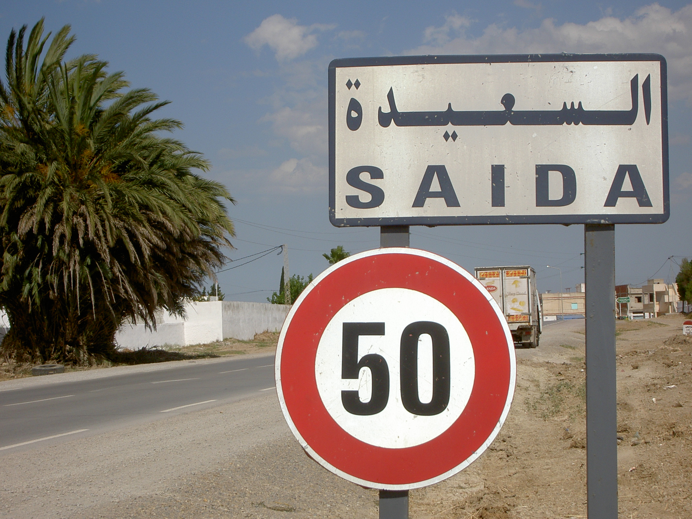 Saida village (17 km from Tunis), Tunisia